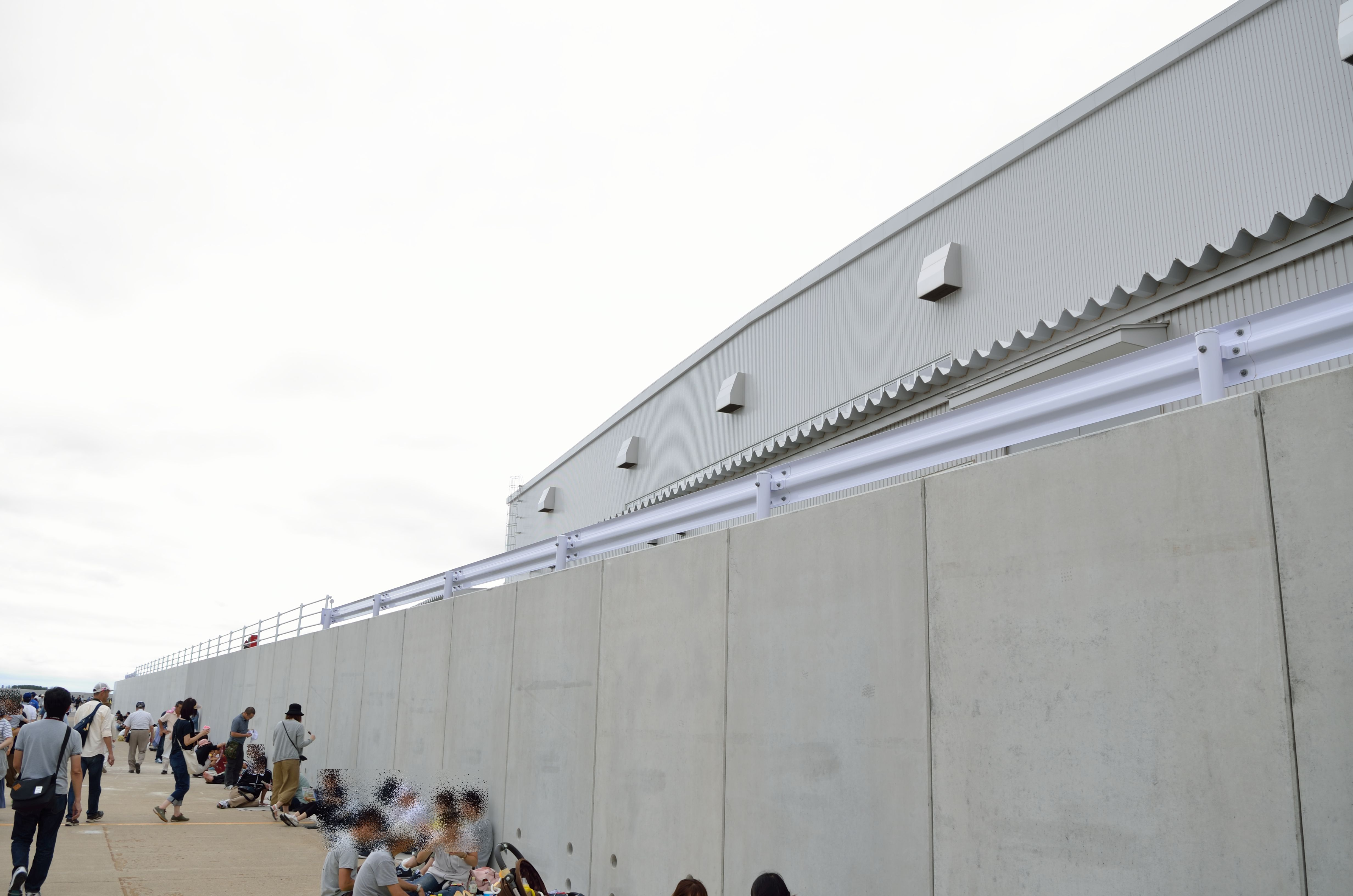 航空自衛隊松島基地で東日本大震災の津波被災後、盛土の上に新たに建設された格納庫。